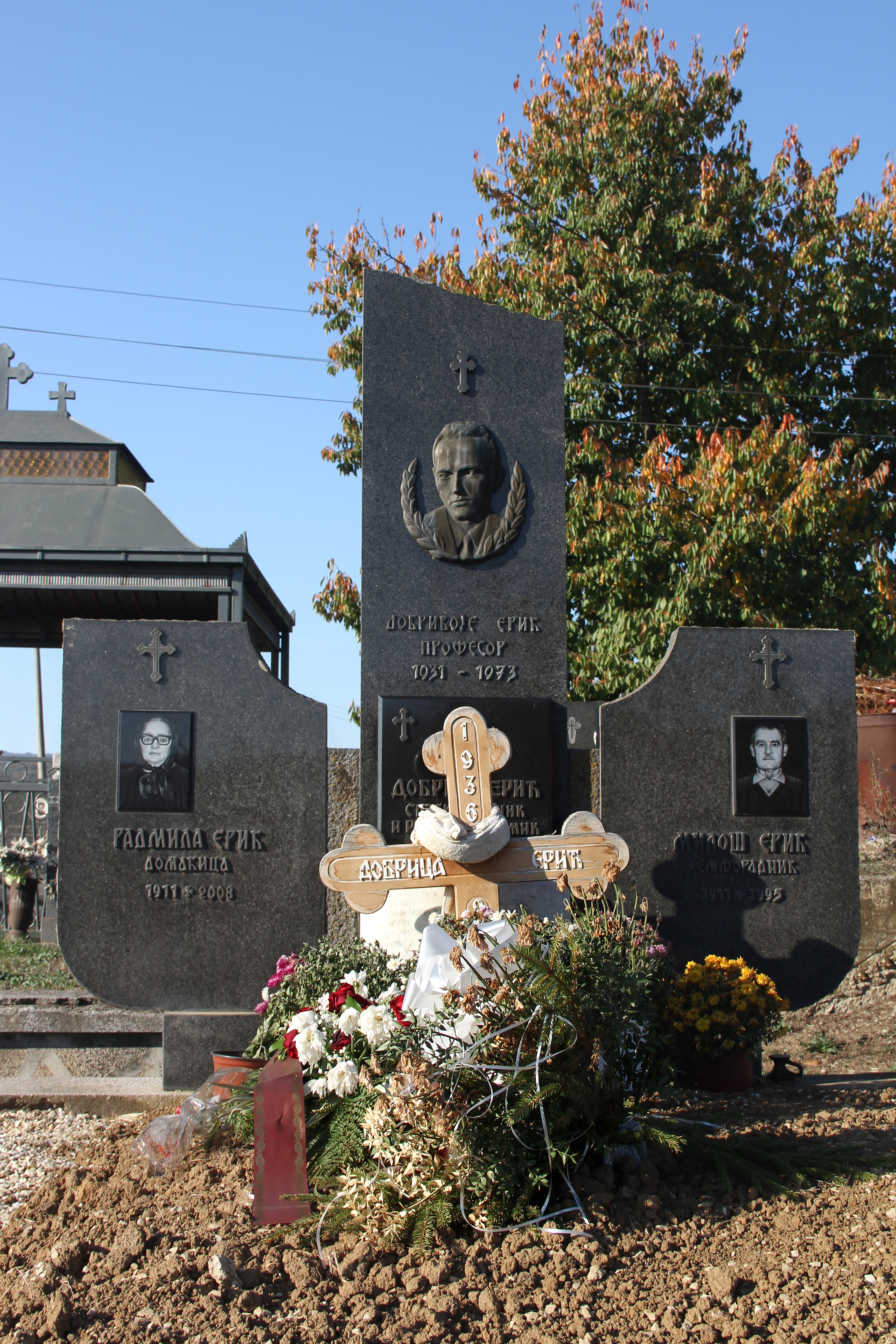 Donja Crnuća